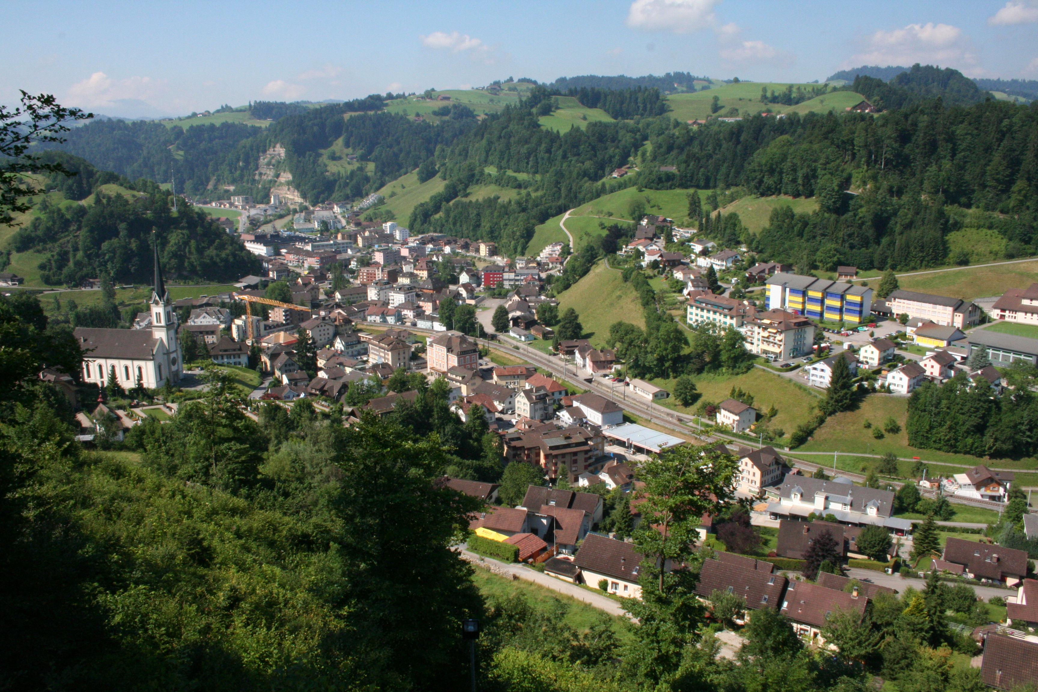 Sicht auf Wolhusen (Aufnahmeplatz: Burg)